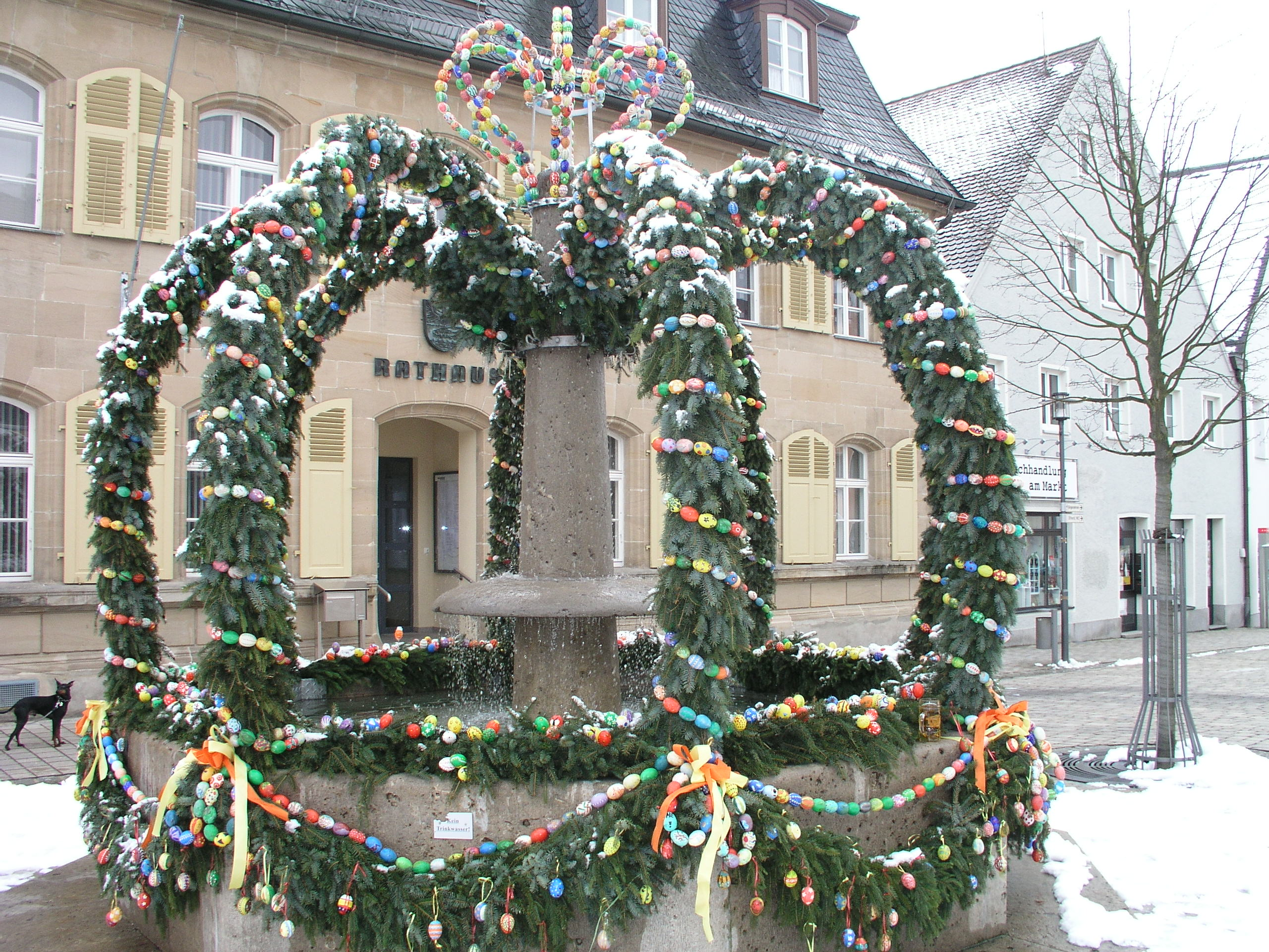 Osterbrunnen in Pegnitz (Franconia)